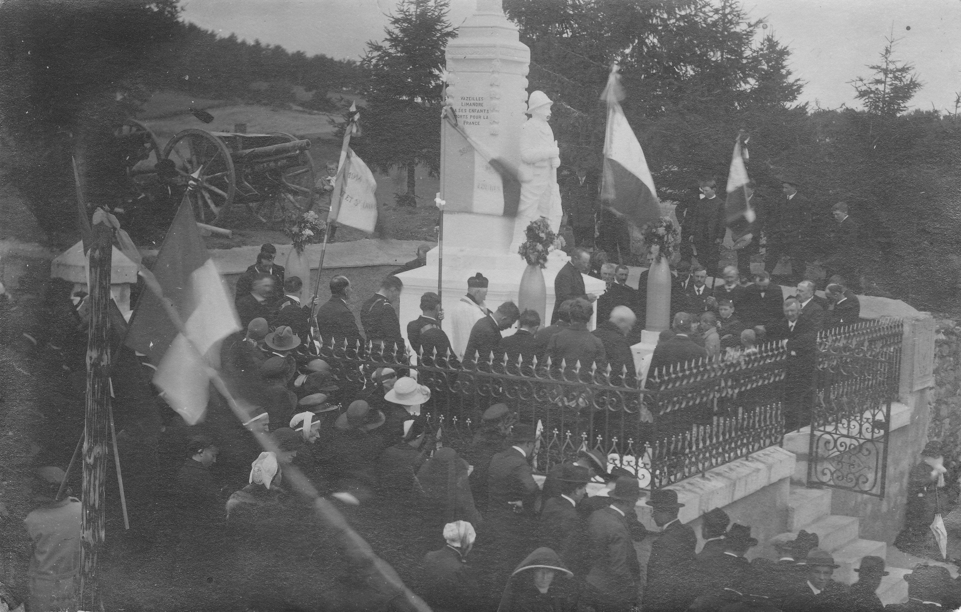 photo de l'inauguration du monument aux morts